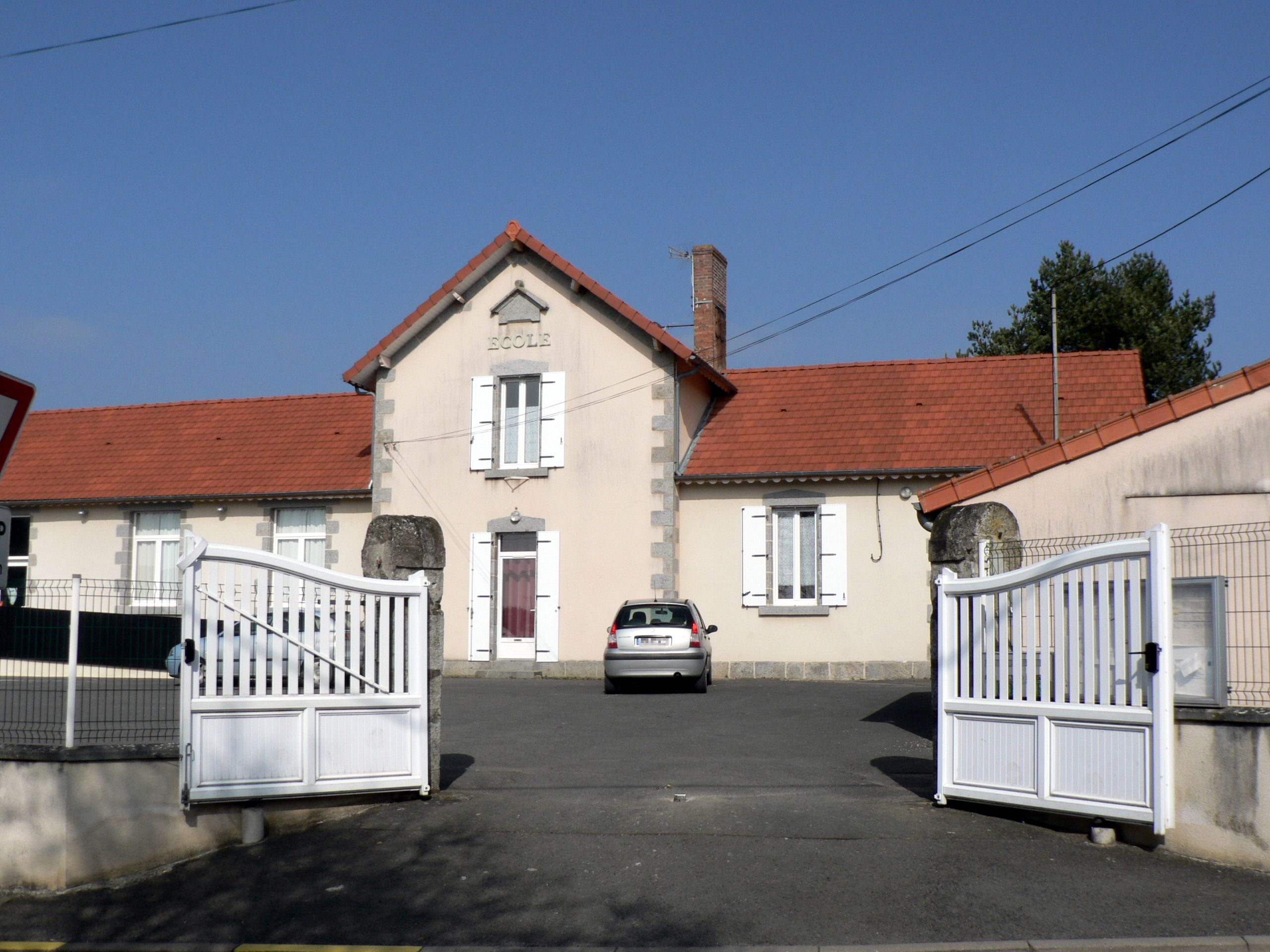 Vue depuis le portail de l'école élementaire de Glénay